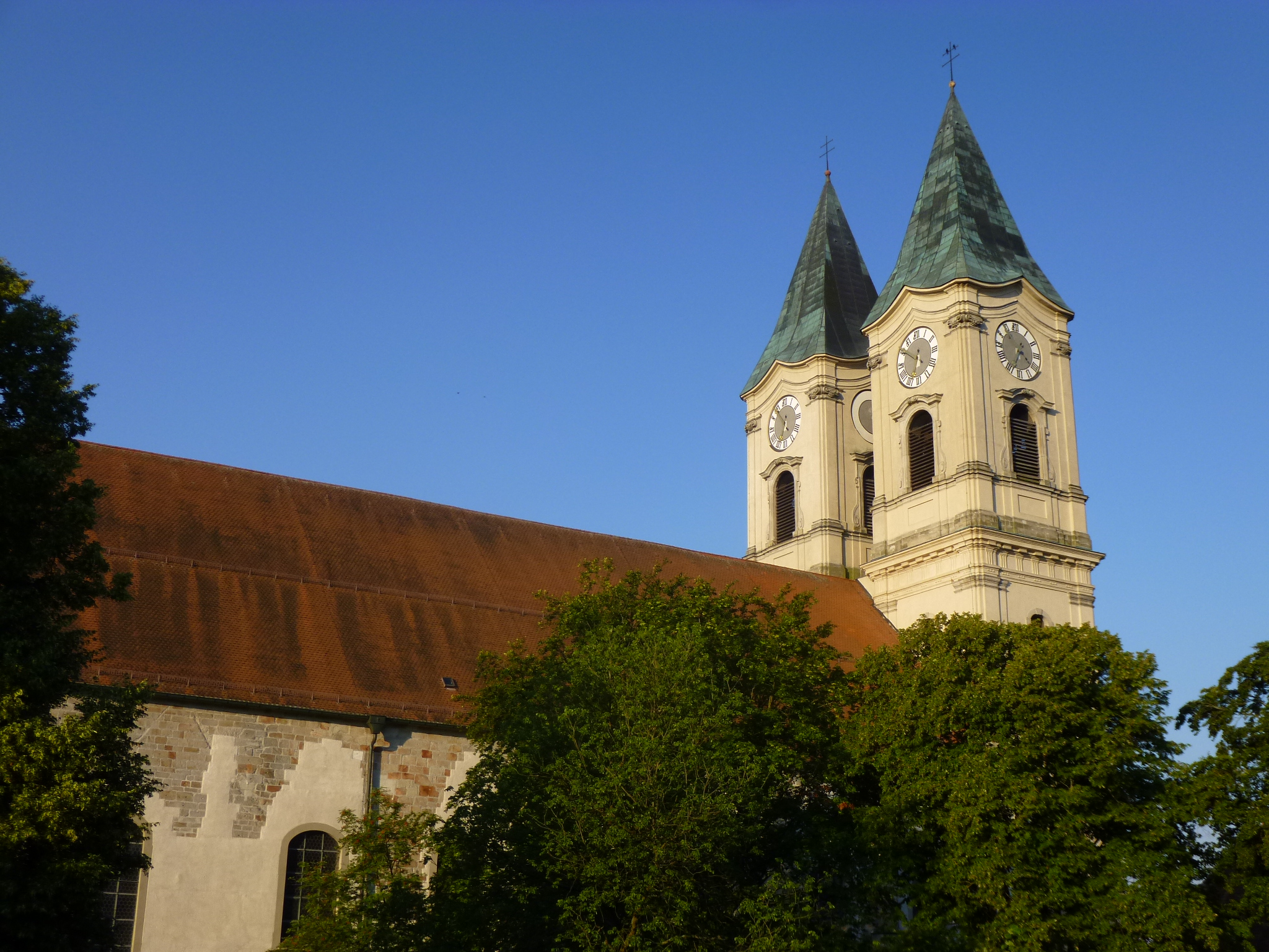 Blick auf die Abtei- und Pfarrkirche St. Mauritius in Niederalteich.This is a photograph of an architectural monument.